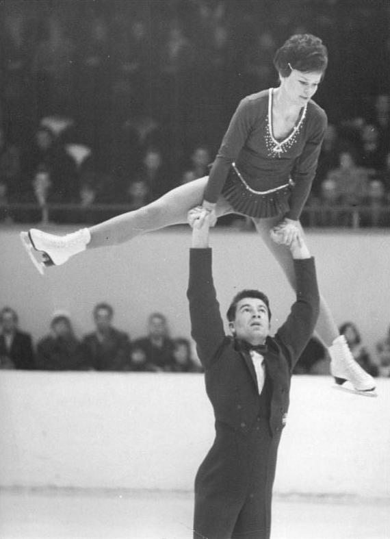 Sonja Pfersdorf, Günter Matzdorf Zentralbild 13.12.1963 Eiskunstlauf, Olympia-AusscheidungenAusgezeichnete Leistungen gab es bei den Ausscheidungskämpfen der Eiskunstläufer der DDR und Westdeutschlands am 12.12.1963 in der Berliner Werner-Seelenbinder-Halle vor 4500 Zuschauern. Nach der Pflicht am Vormittag wurde am Abend der erste Durchgang der Olympia-Ausscheidungen um die freien vier Plätze für Innsbruck mit dem Kürprogramm beendet. Die Würfel fallen dann endgültig am 19.12.1963 im Westberliner Sportpalast. UBz: Das westdeutsche Paar Sonja Pfersdorf-Günter Matzdorf gefiel durch gute Hebefiguren.Sie liegen auf Platz drei (15-10,28). -Studré